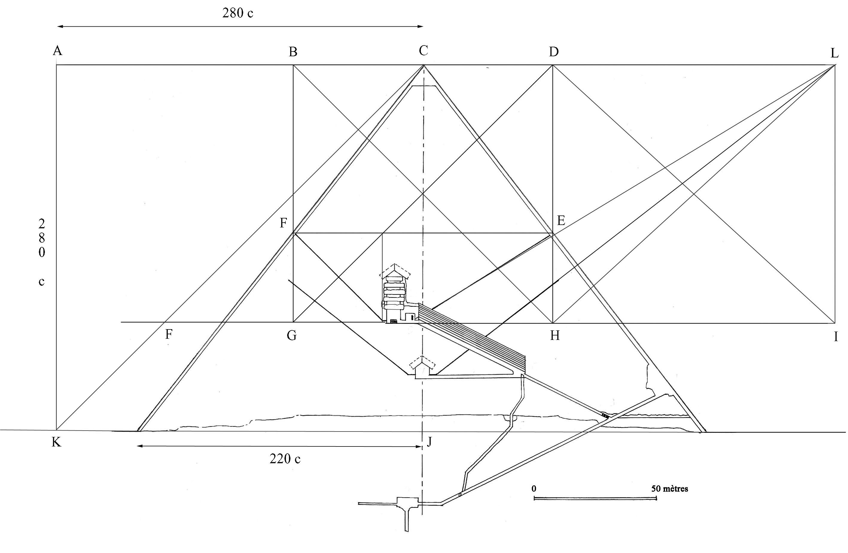 Interprêtation d'une géométrie des conduits de ventilation de la pyramide de Khéops